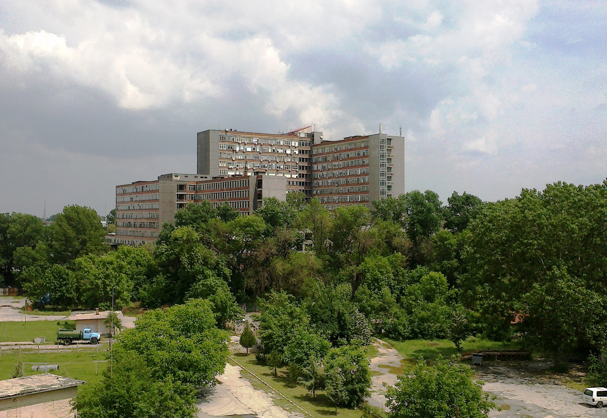 МБАЛ - Пловдив